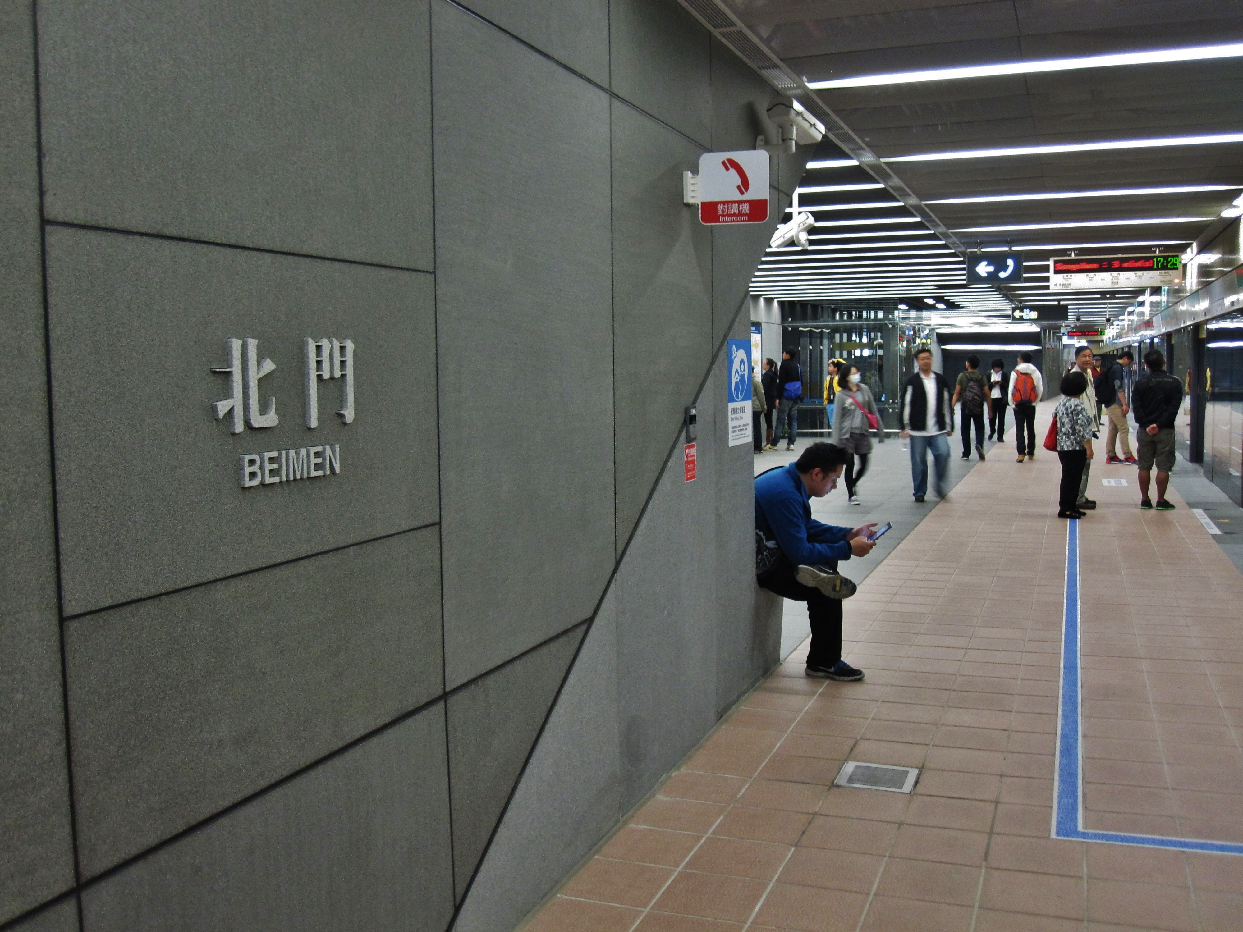 中文（台灣）: 捷運松山線北門站月台一